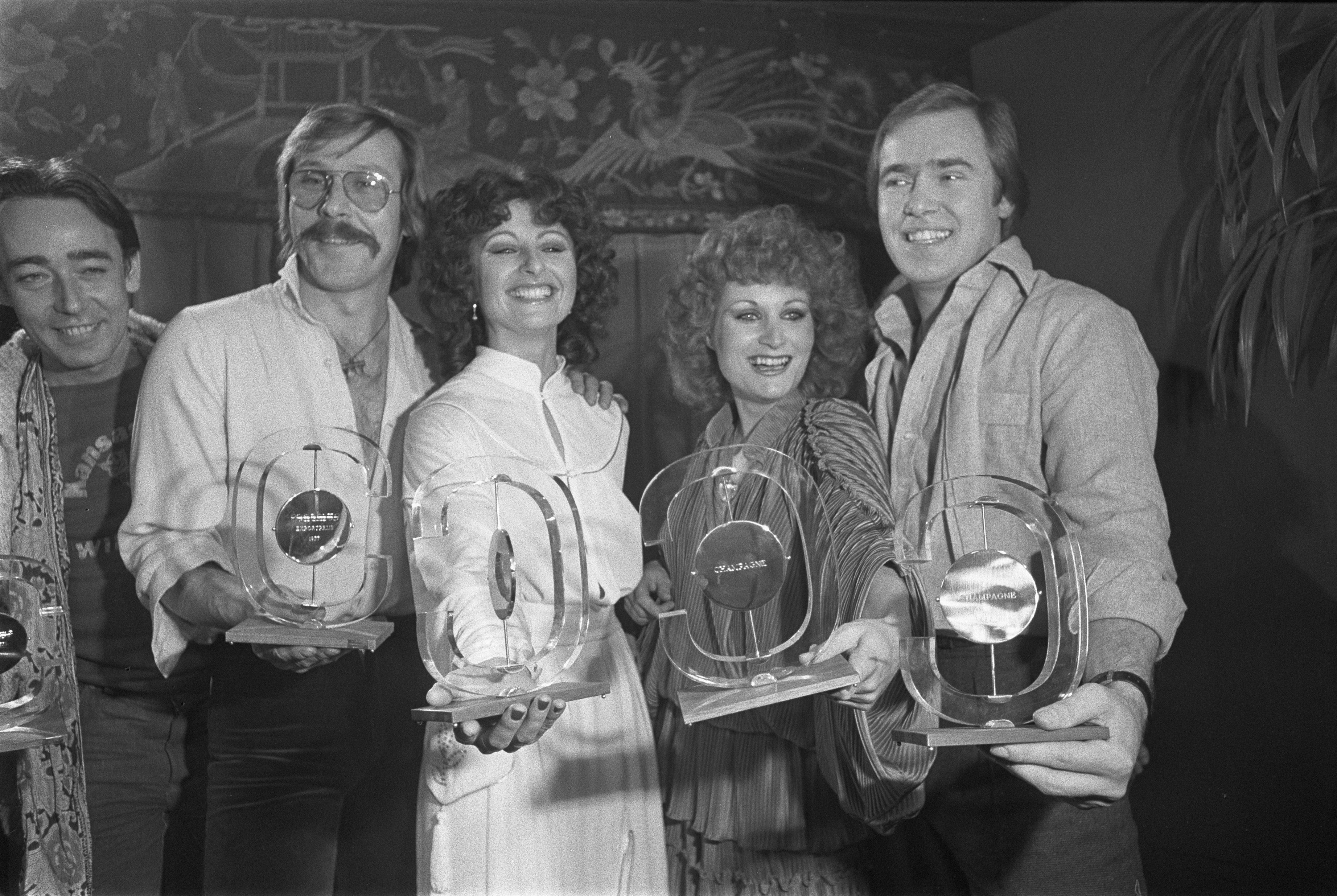 Collectie / Archief : Fotocollectie Anefo Reportage / Serie : [ onbekend ] Beschrijving : Exportprijs 77 voor de groep Champagne uitgereikt in de Suikerhof in Amsterdam Datum : 4 januari 1978 Locatie : Amsterdam, Noord-Holland Trefwoorden : prijzen Fotograaf : Peters, Hans / Anefo Auteursrechthebbende : Nationaal Archief Materiaalsoort : Negatief (zwart/wit) Nummer archiefinventaris : bekijk toegang 2.24.01.05 Bestanddeelnummer : 929-5101 Reacties Geplaatst door Maaike op 08 november 2013 - 22:47. Instellingsnamen: Stichting Conamus Persoonsnamen: (leden van de groep 'Champagne') Paulette Bronkhorst, Trudie Huijsdens, Jan Vredenburg, Bert van de Wiel en Wally Tax NB. Martin Duiser, Piet Souer en Wally Tax (links op de foto) ontvingen ook de Conamus Exportprijs 1977